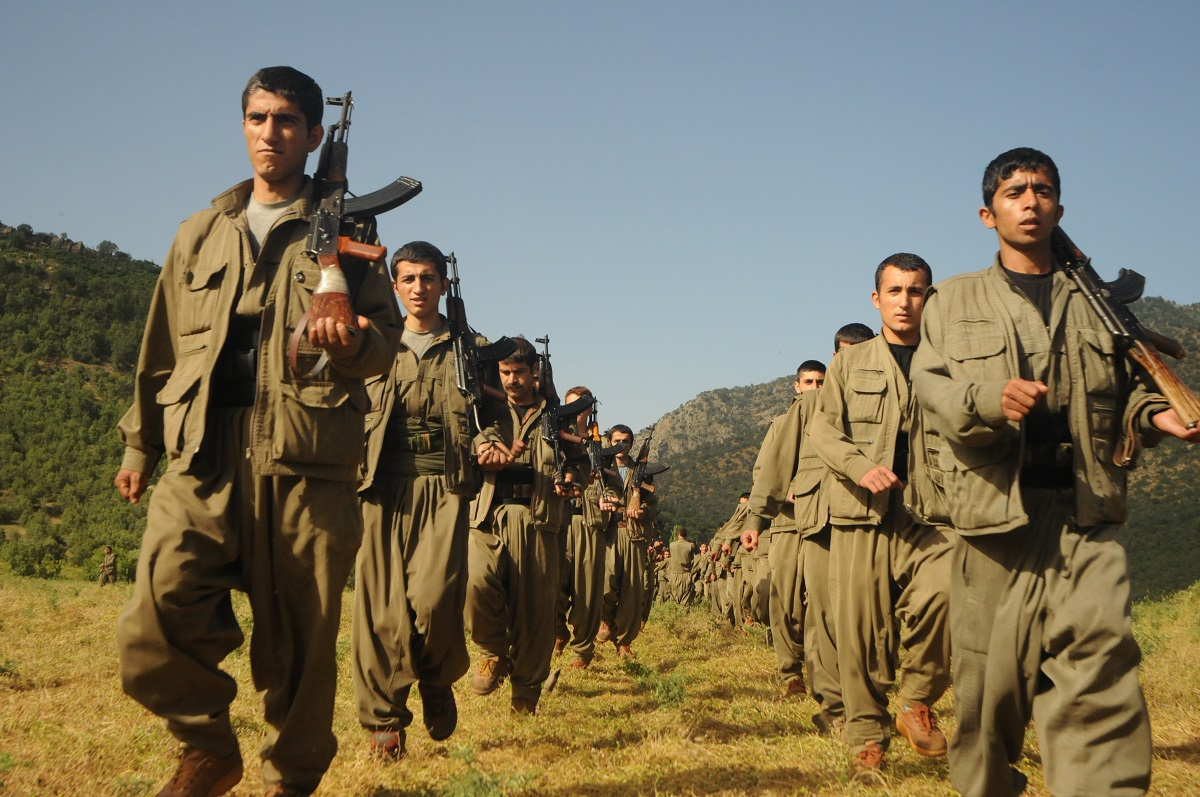 YPG